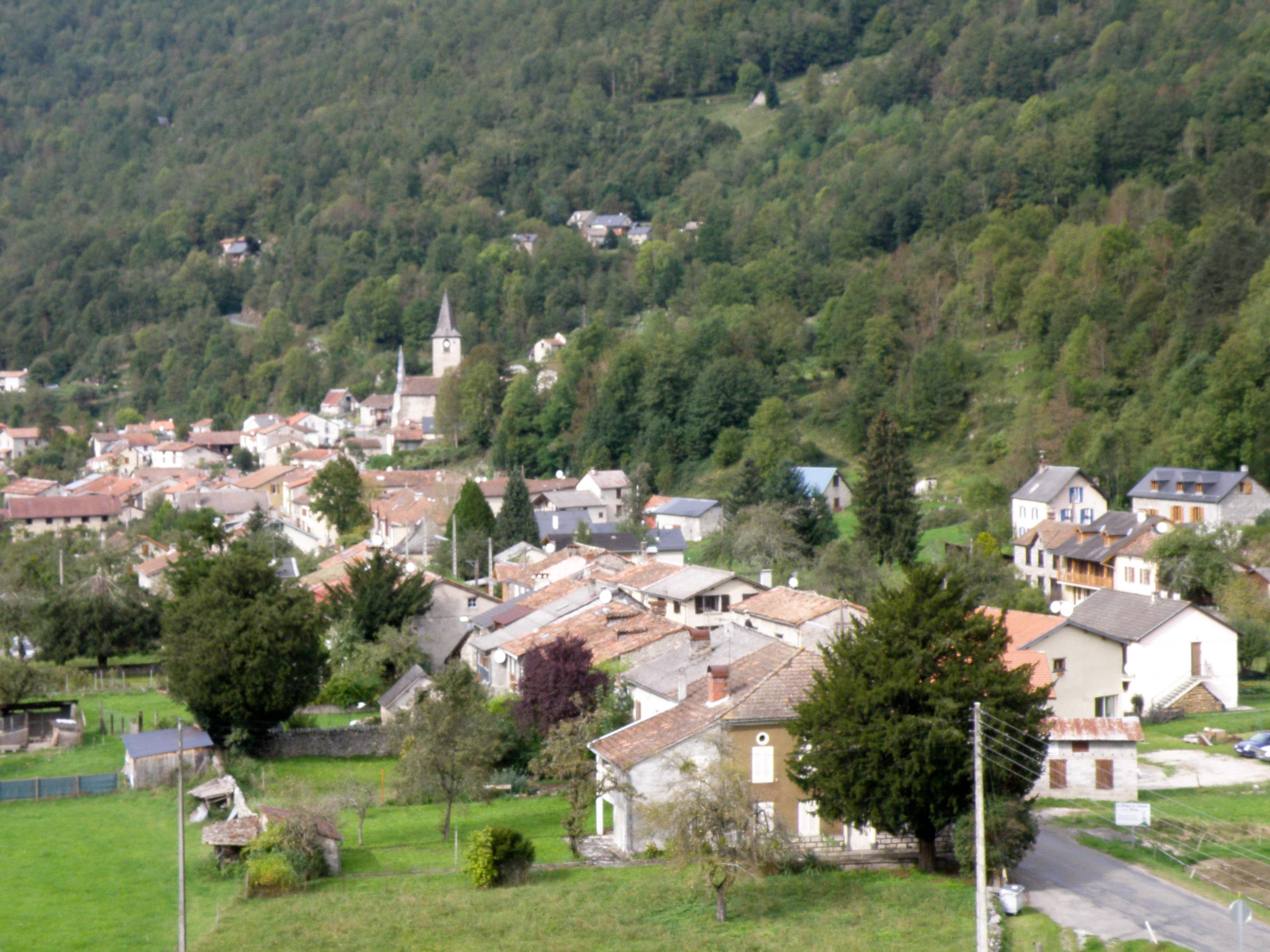 Le village vue depuis le calvaire - Ercé - Ariège (France)